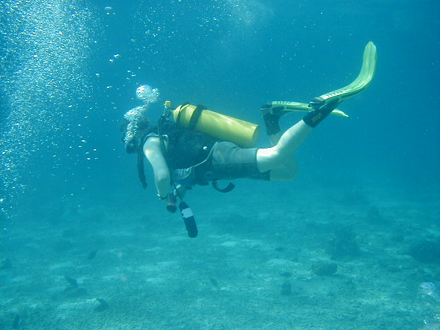 Bilde av dykker tatt ved Great Barrier Reef.